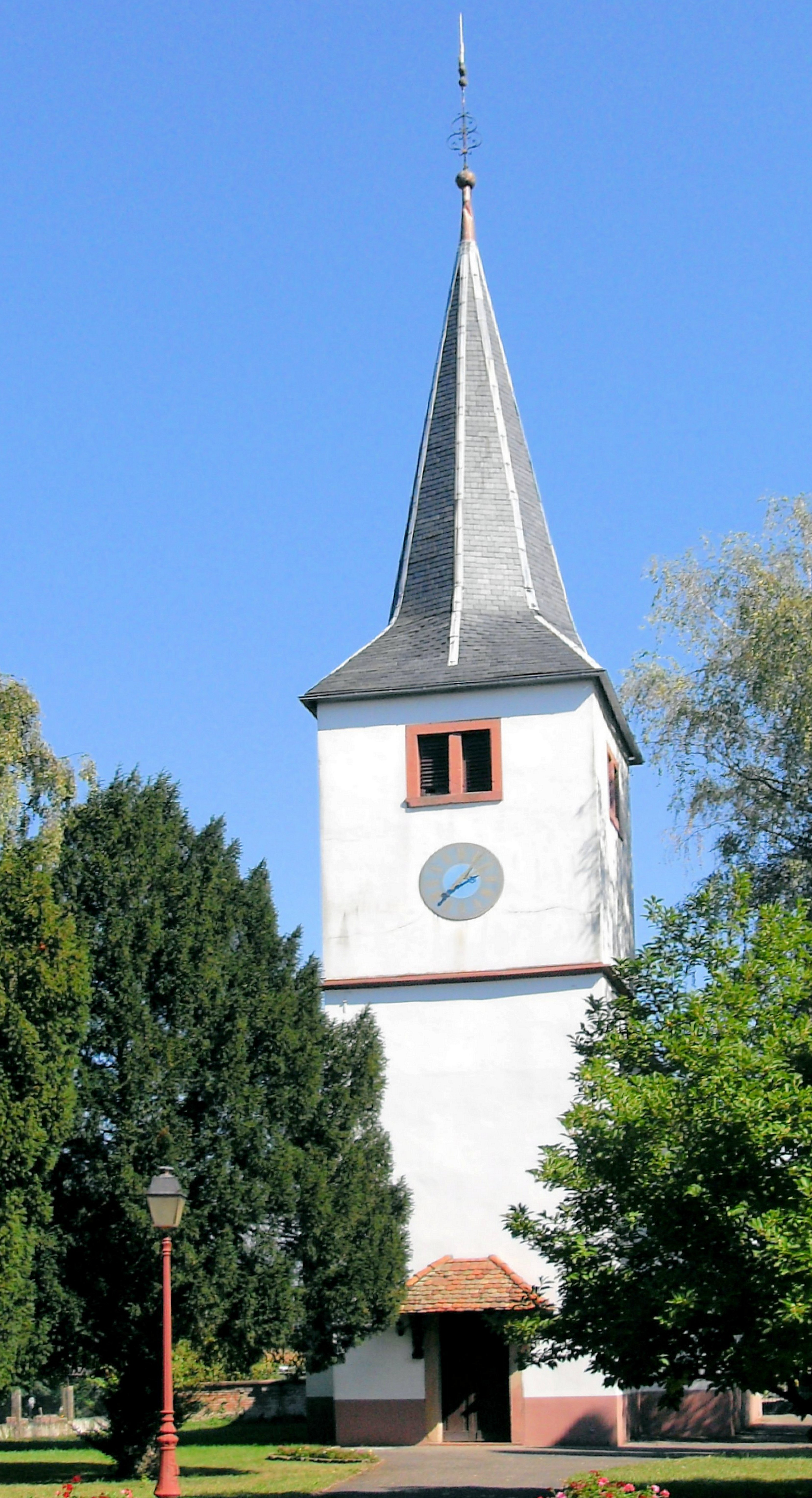 L'église Saint-Jean-Baptiste, église protestante, à Kauffenheim